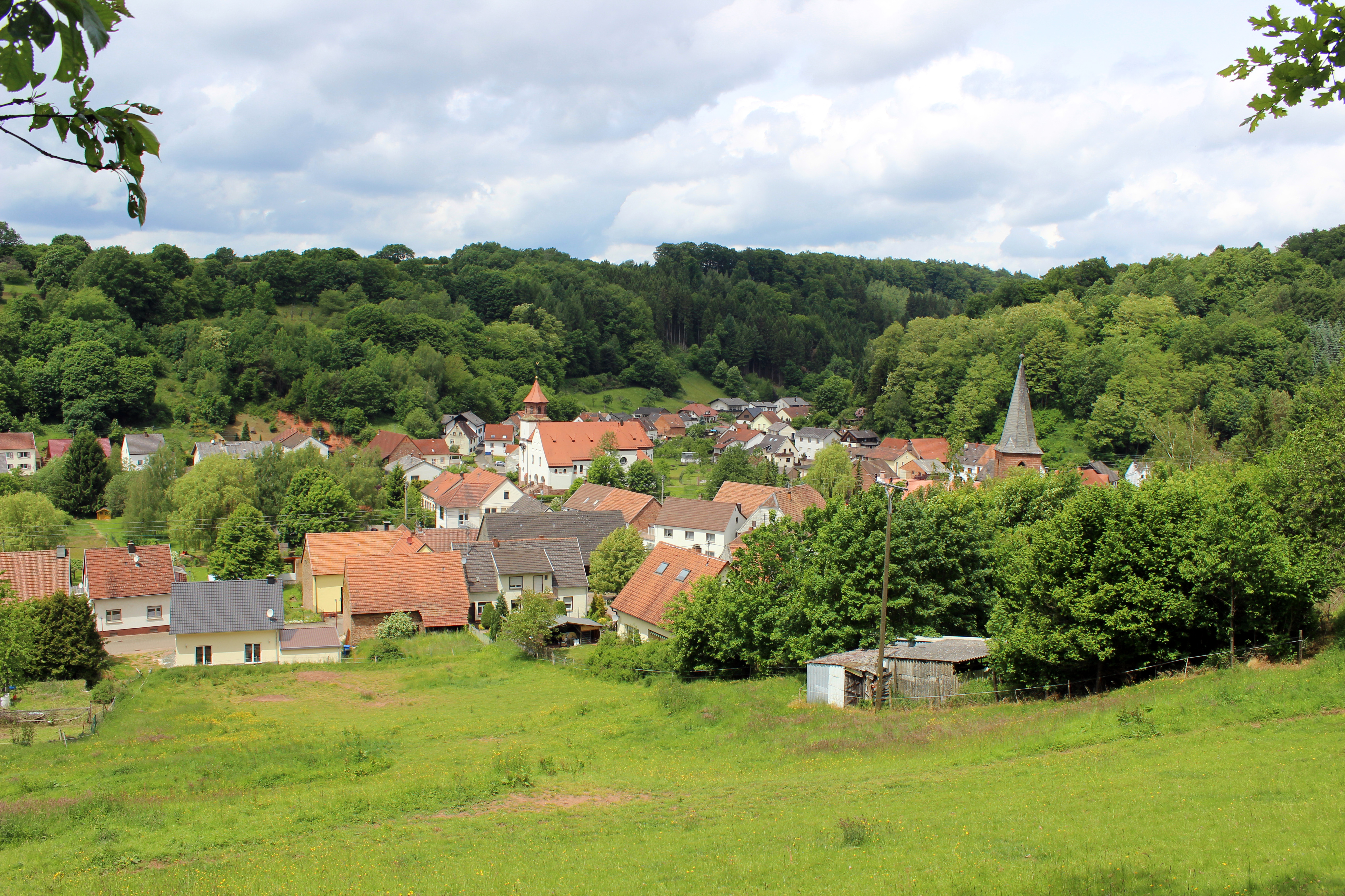 Ansicht von Wiesbach (Pfalz), Landkreis Südwestpfalz, Rheinland-Pfalz